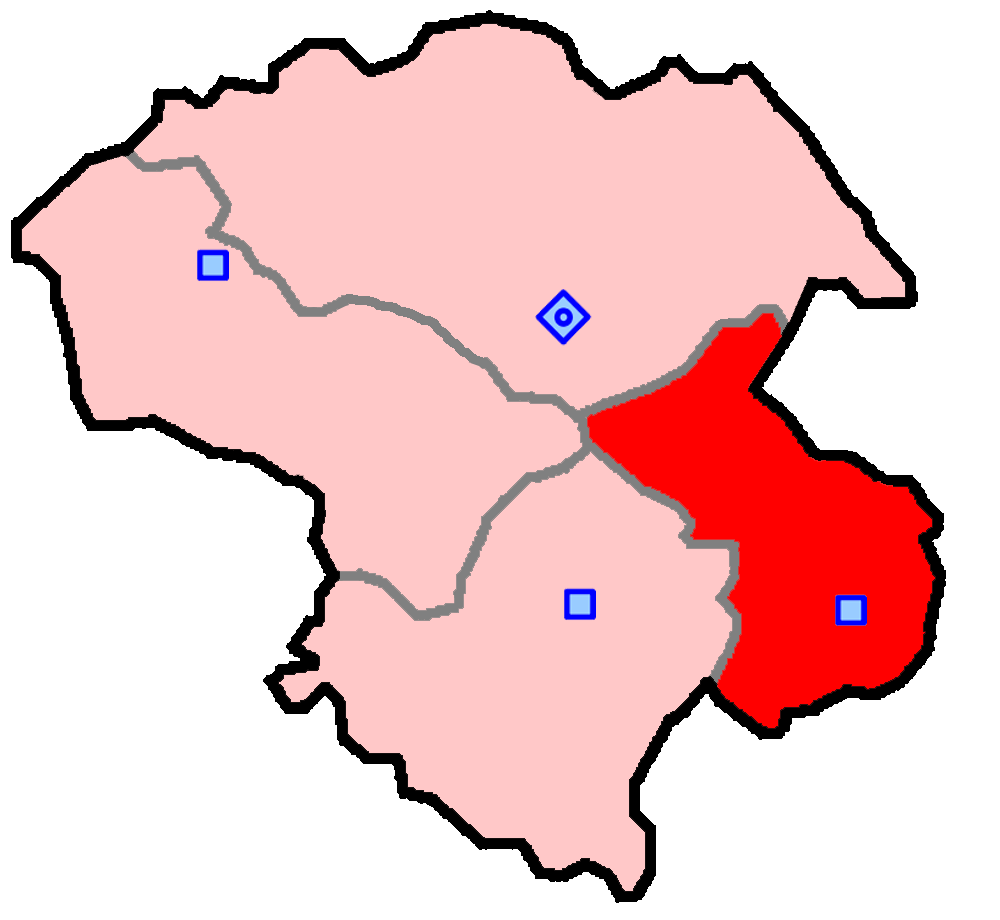 حوزهٔ انتخاباتی ابهر و خرمدره برای انتخابات مجلس شورای اسلامی